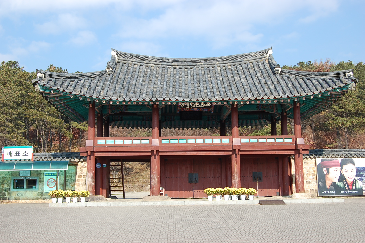 분류:충청남도 그림 분류:건축물 그림